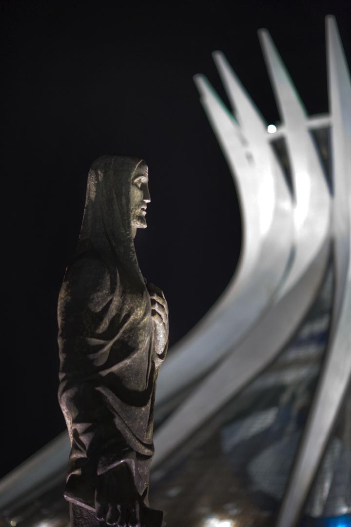 Brasilia, Brazil